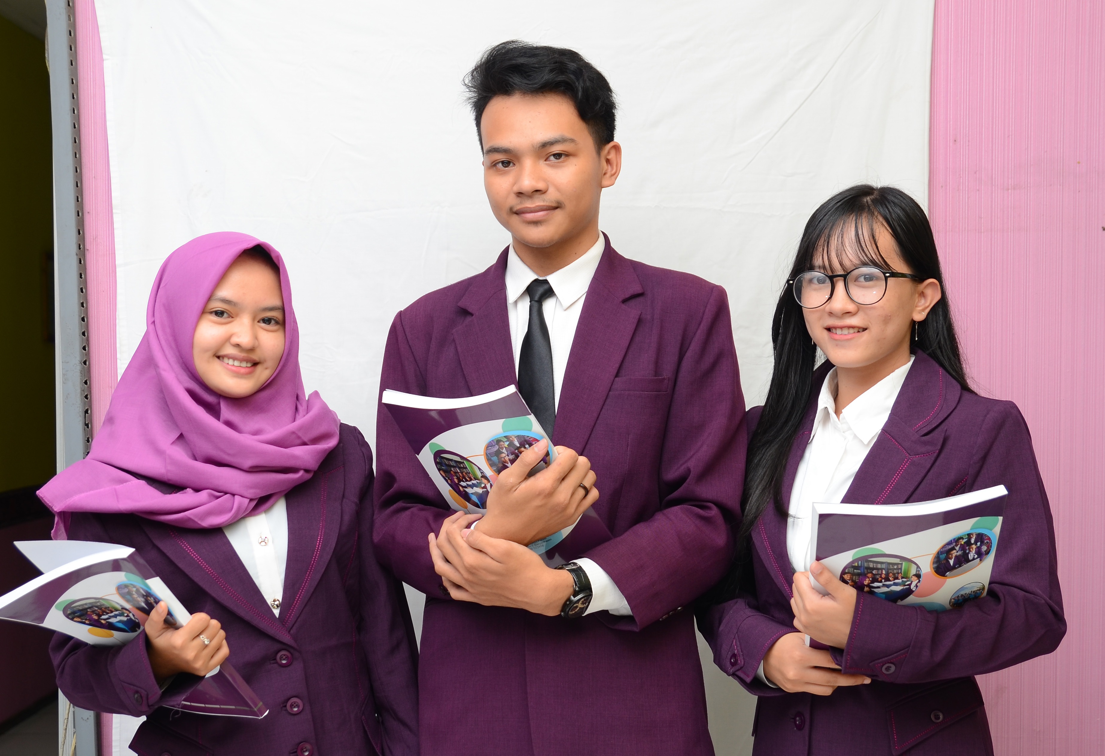 Seragam yang digunakan peserta pelatihan di ELTIBIZ.